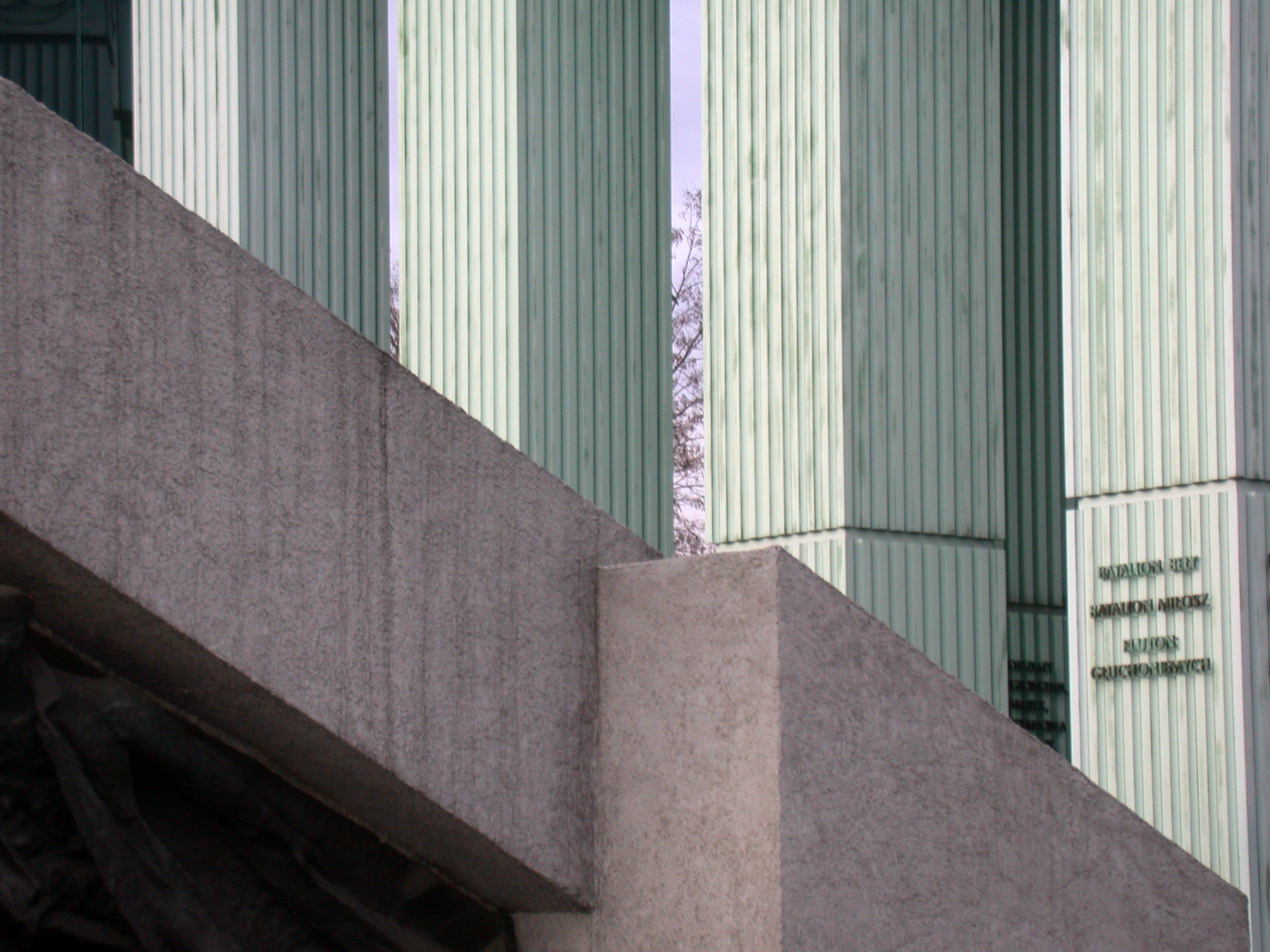 Varsavia, Piazza Krasińskich (Plac Krasińskich), monumento alla Rivolta di Varsavia del 1944 (Pomnik Powstania Warsawkiego 1944), particolare.